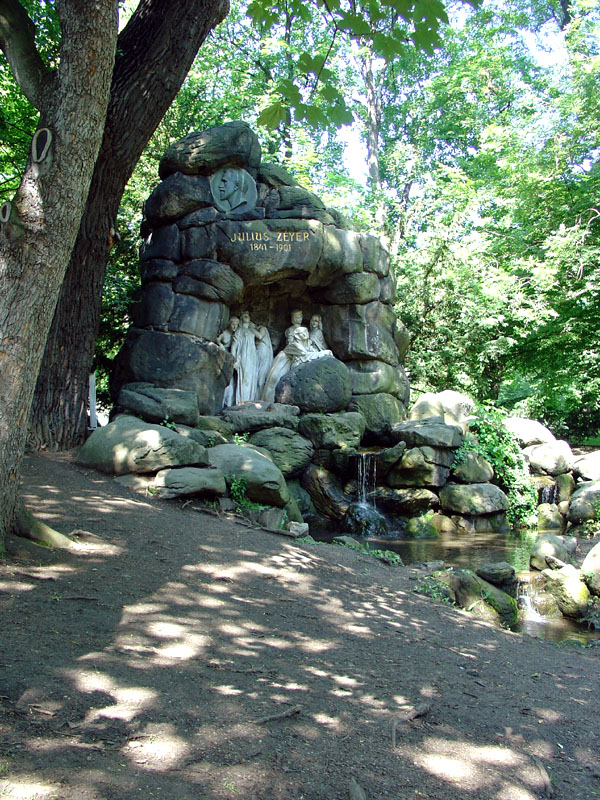 Památník Julia Zeyera poblíž Pražského hradu. Vlastní foto 21-06-06